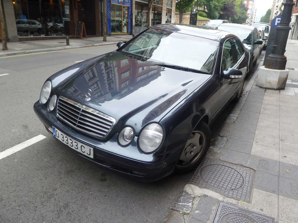 Germany